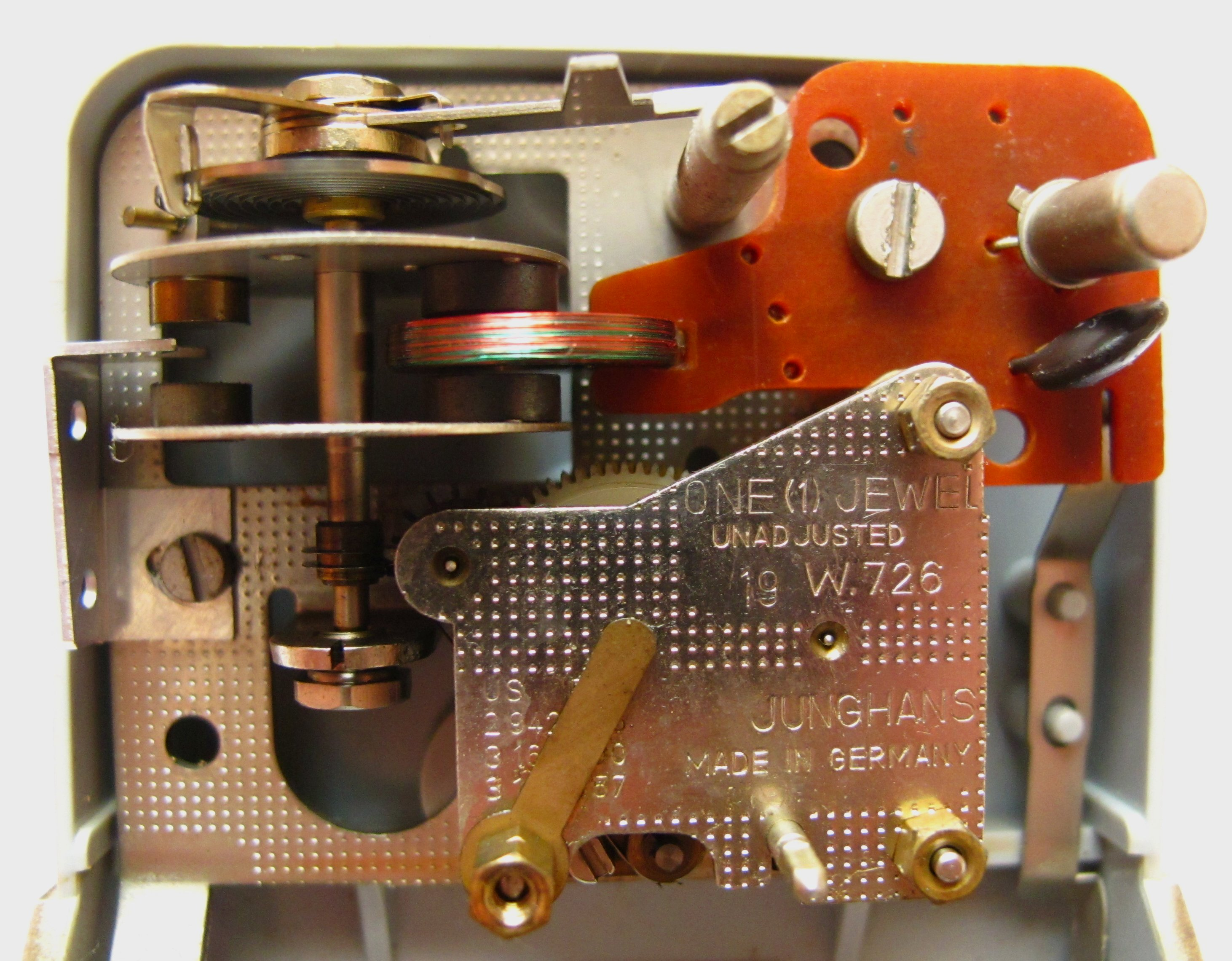 Elektromechanisches Uhrwerk W726 mit Sperrschwinger und Unruhe von Junghans. Siehe auch Beschreibung Junghans ATO-Mat